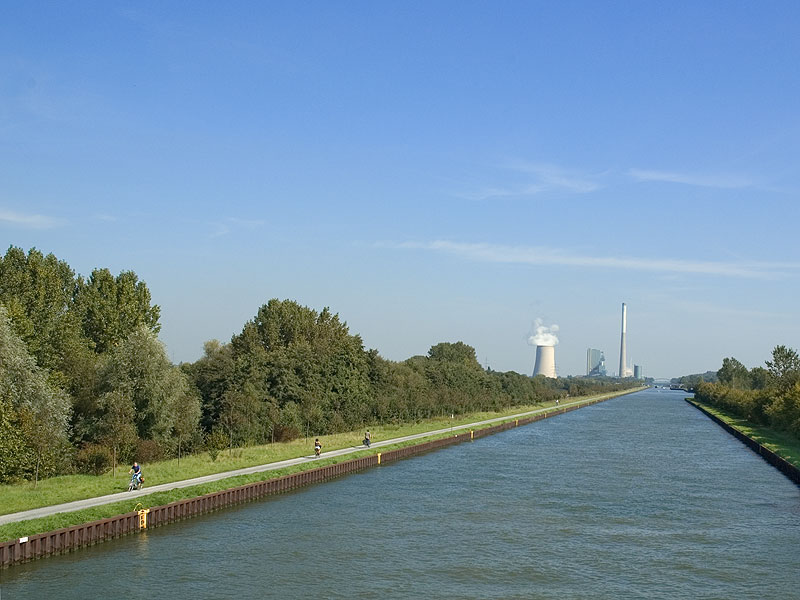 Germany Bergkamen Datteln-Hamm-Kanal